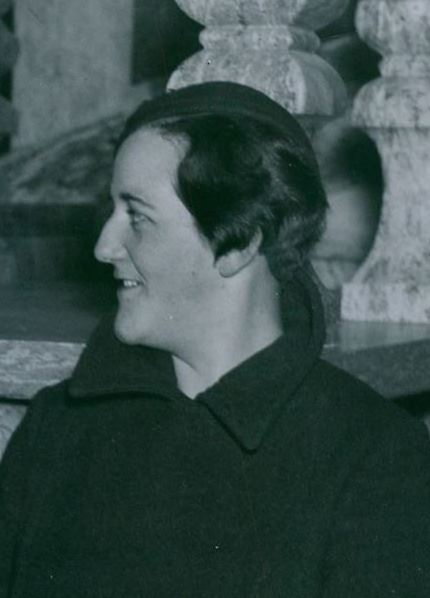 Ibi Trier Mørch (1910-1980), dansk arkitekt och konsthantverkare, i Stockholm 1935.